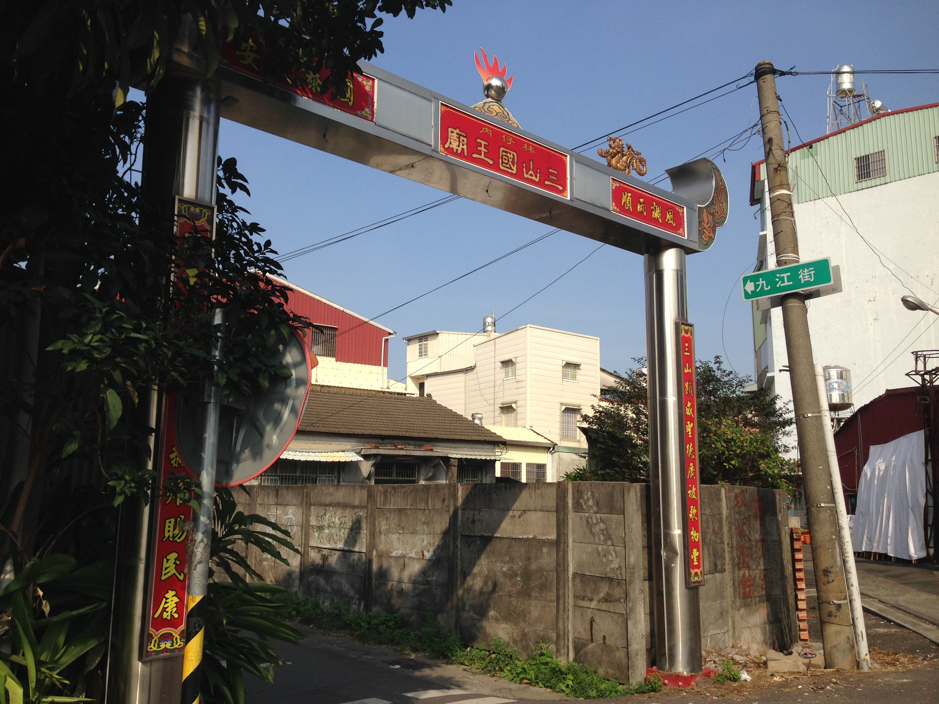 中文（台灣）: 林仔內三山國王廟牌枋